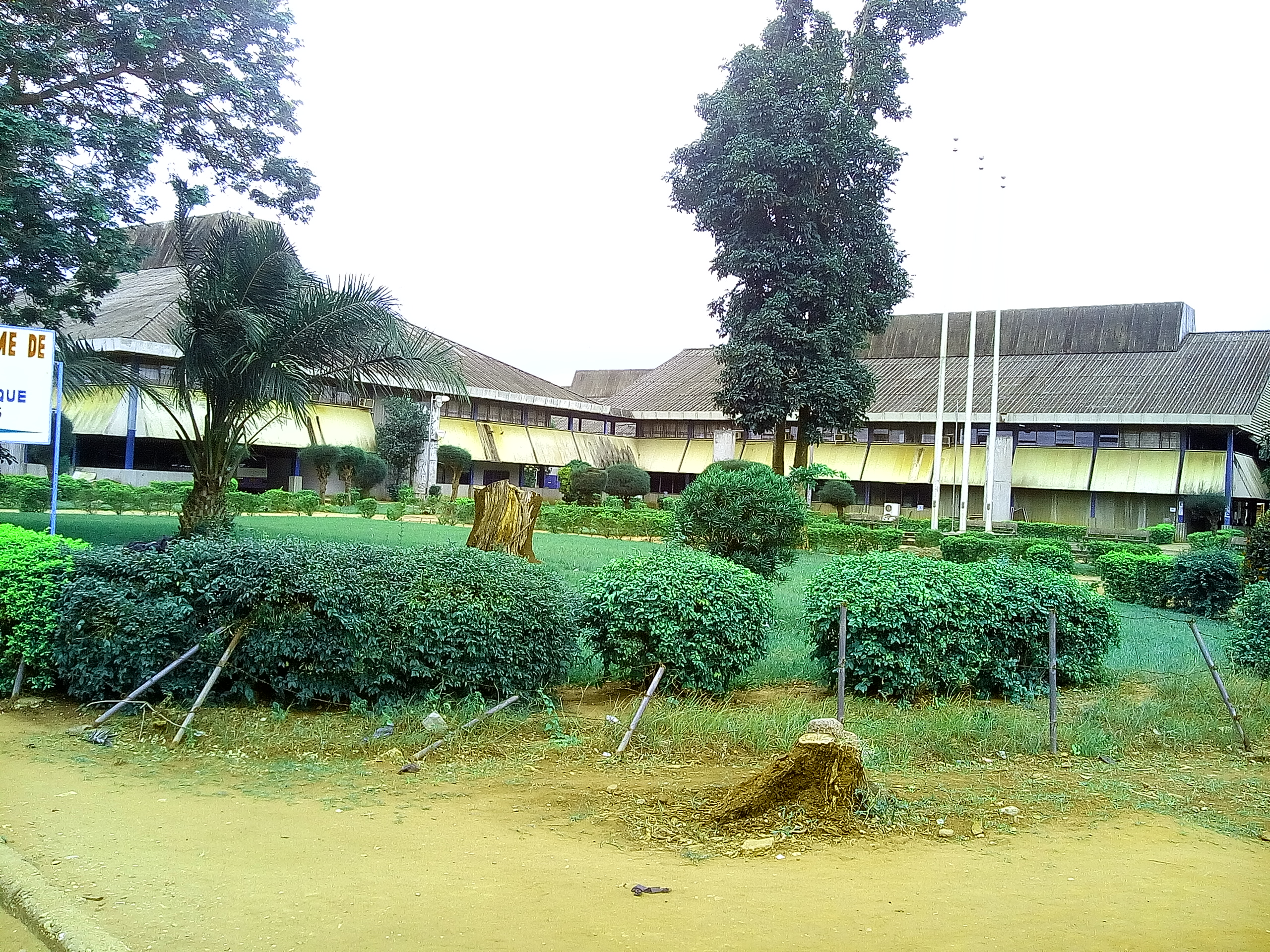 UAC-ÉPAC-BÉNIN.